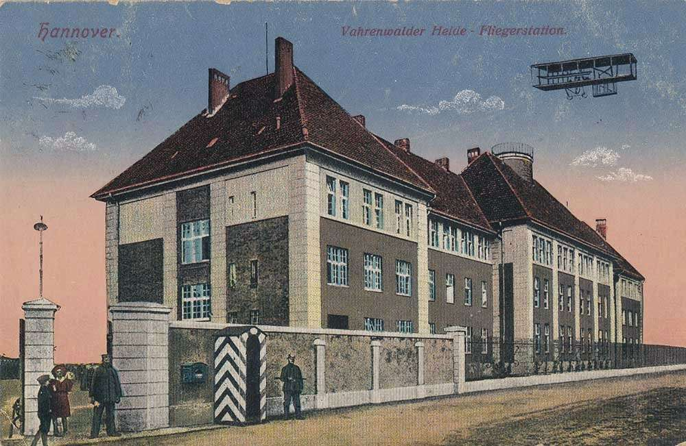 Kolorierte Ansichtskarte der Norddeutschen Papier-Industrie (ursprünglich mit der fortlaufenden Nummerierung Nummer 665) mit einer teils nachgezeichneten Ansicht des Gebäudes der Fliegerstation in der Vahrenwalder Heide ...